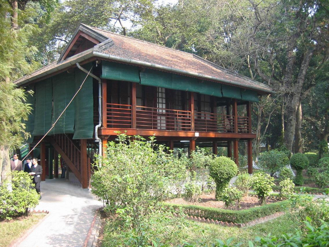 Maison sur pilotis où vécut Ho Chi Minh de 1958 à 1969